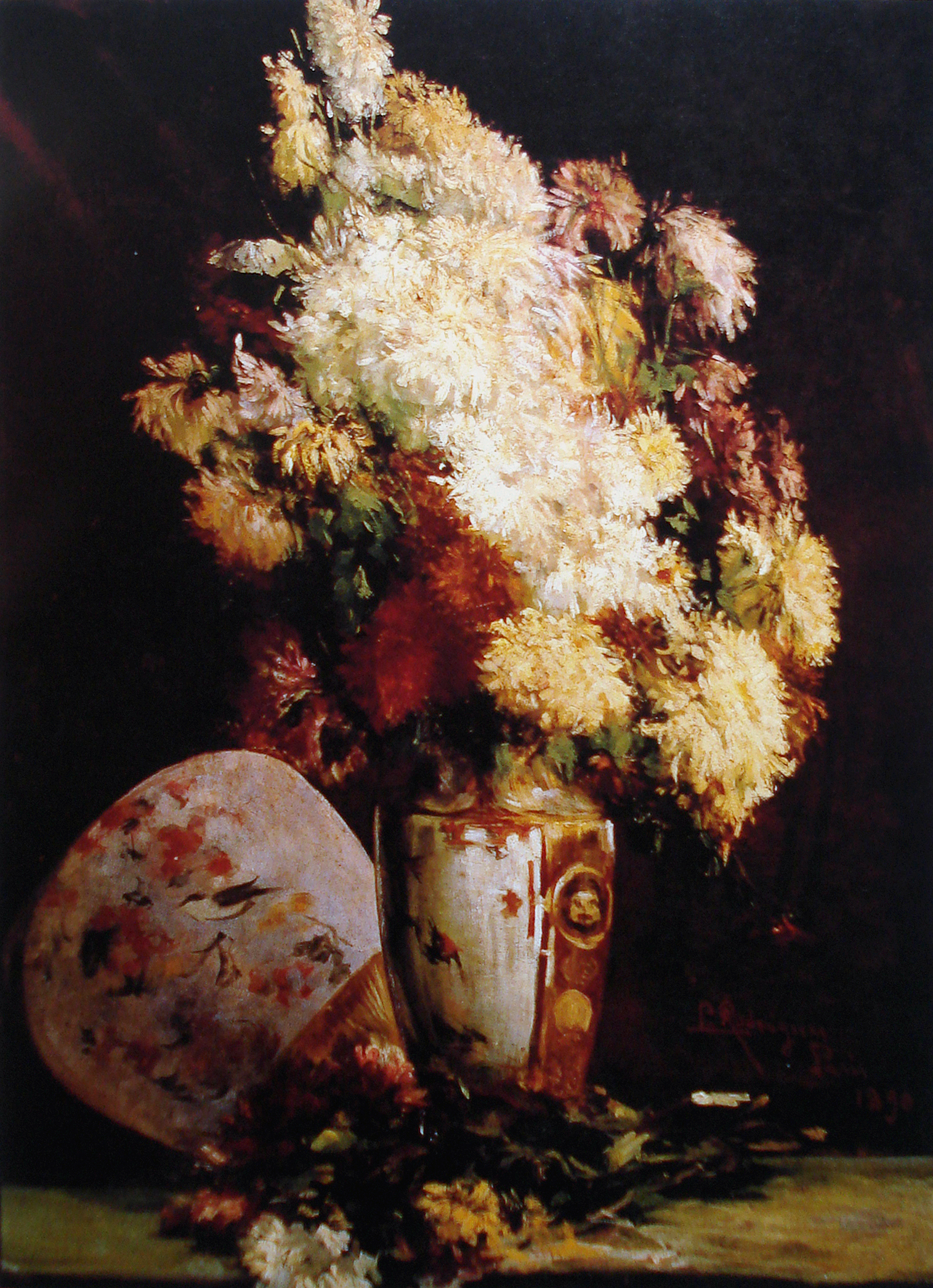 Still Life